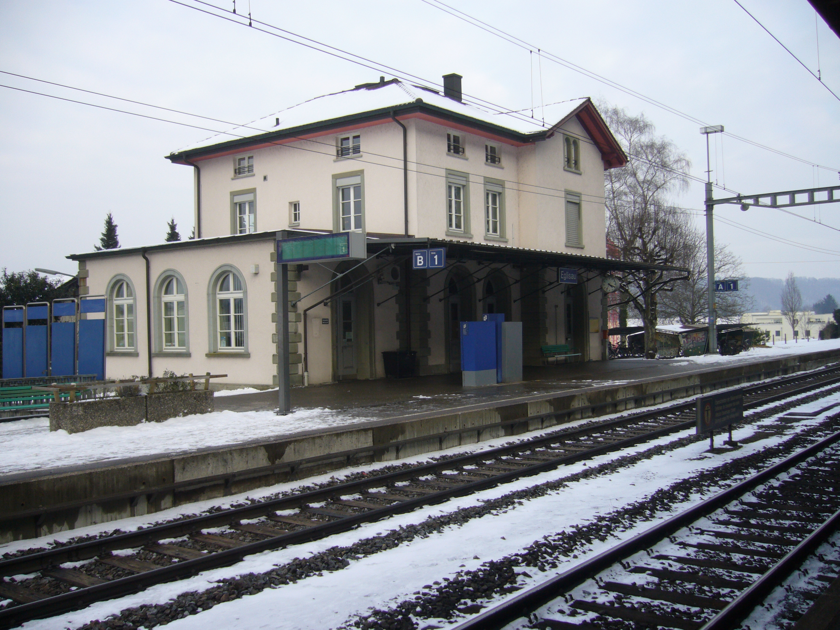 Blick über Gleiſe aufs Stationsgebäud Egliſau.